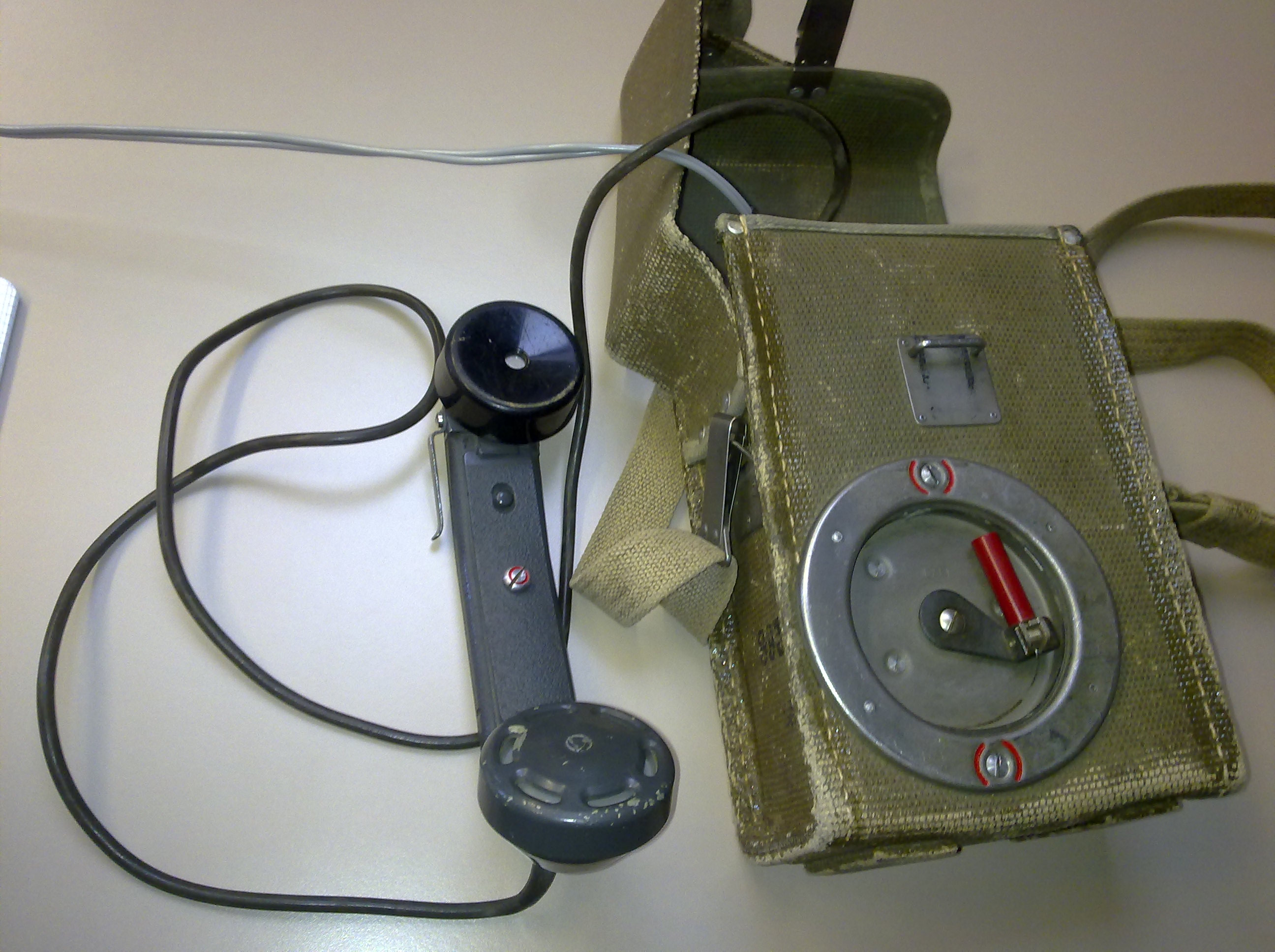 funktioniert mit 1.5V-Batterie und Kurbel über 30 km Kabel (F2E)